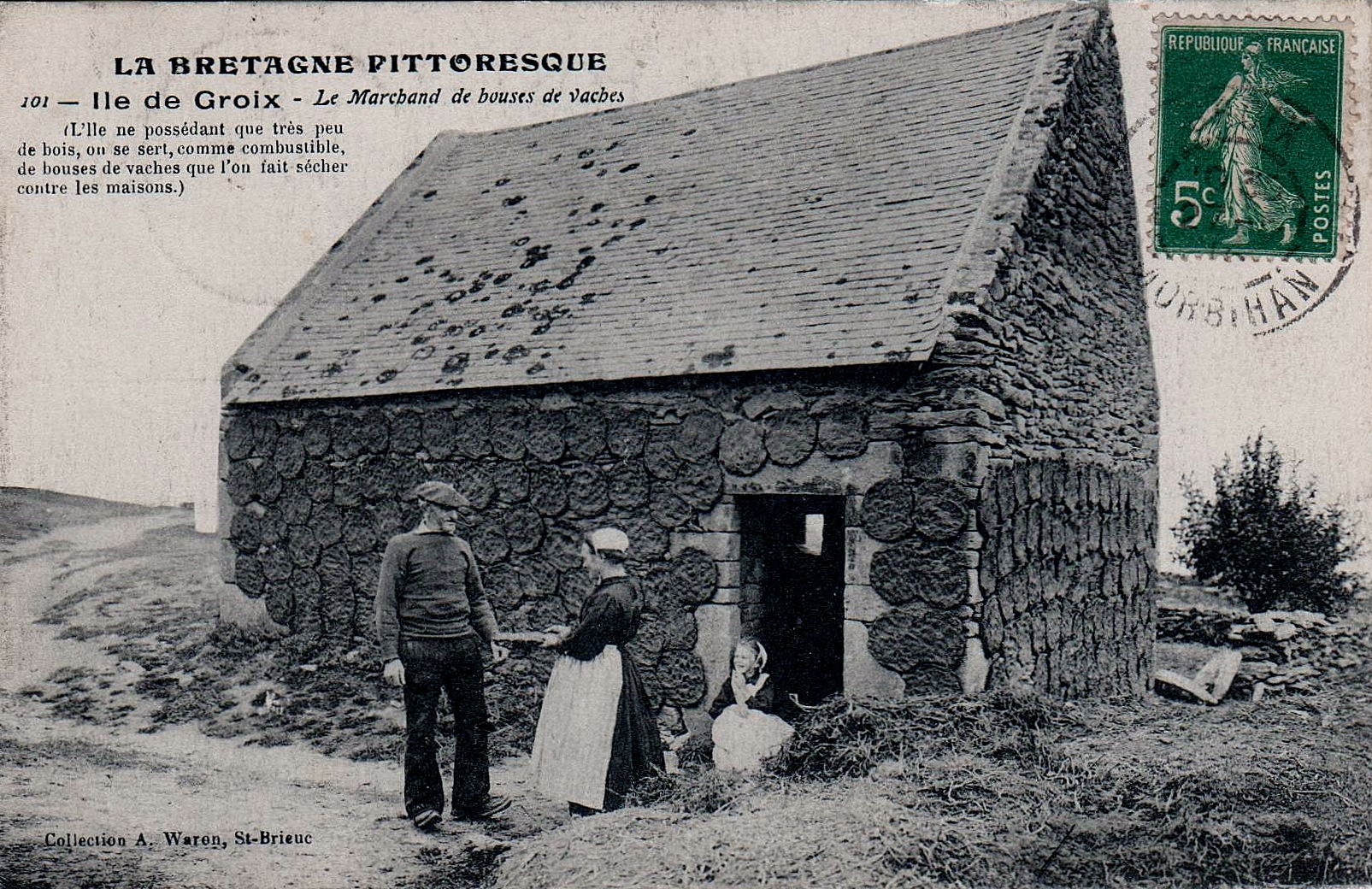 Groix : marchand de bouses de vaches et bouses de vache séchant sur le mur d'une maison afin de servir de combustible.